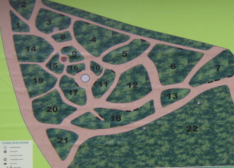 Схема Английского парка.